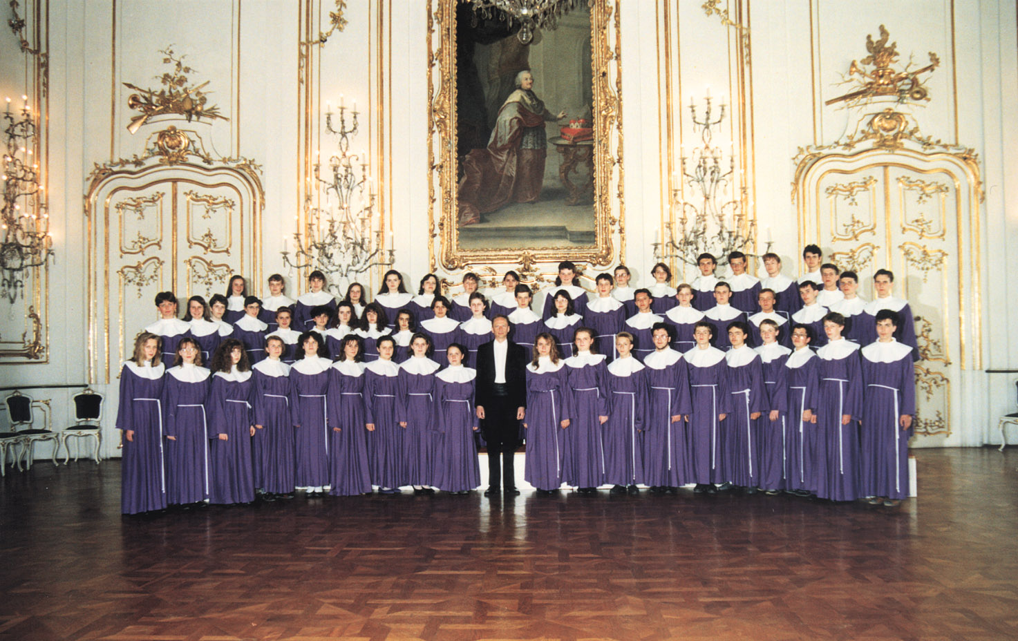 Sbor Ave